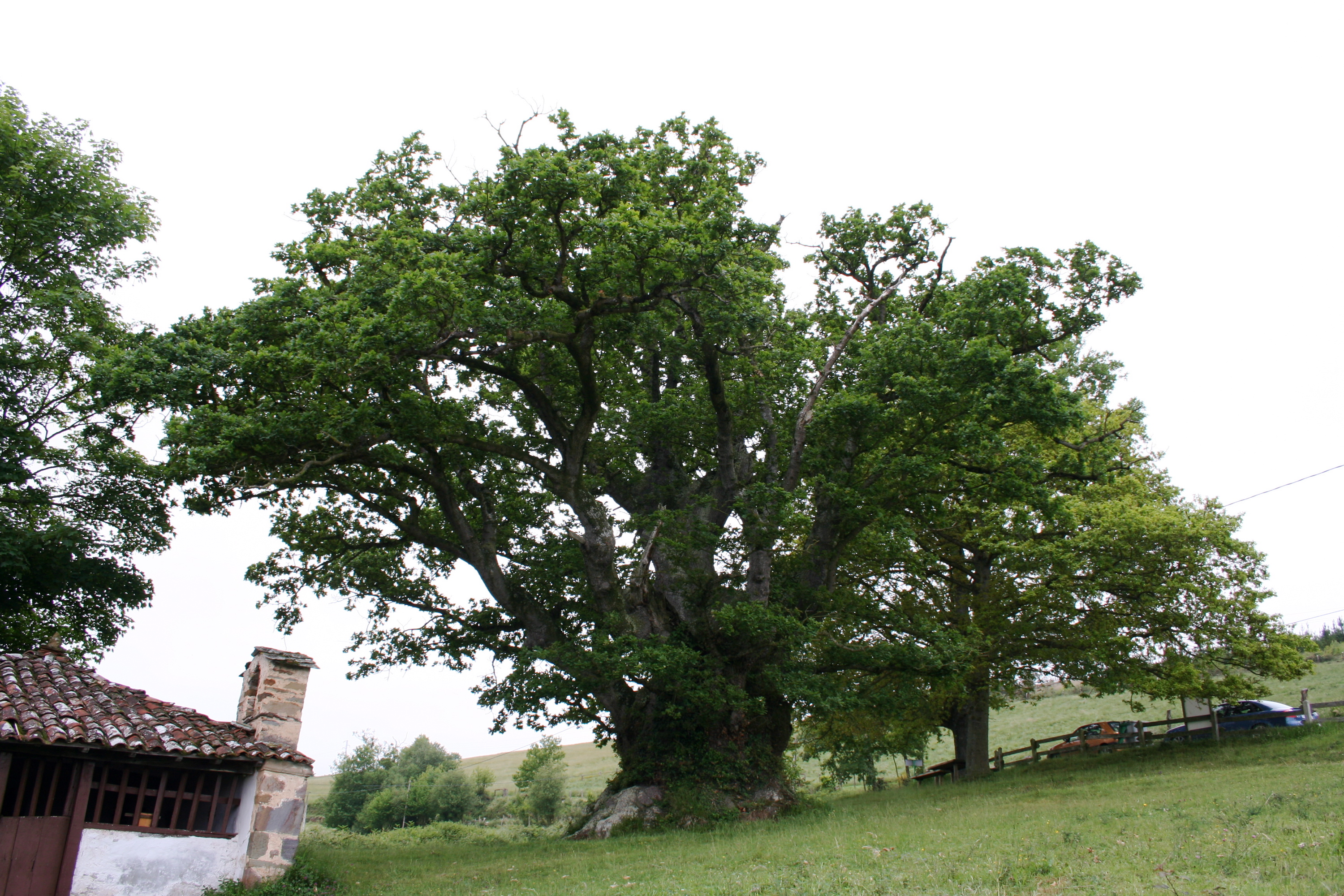 Carbayón de Valentín, tronco